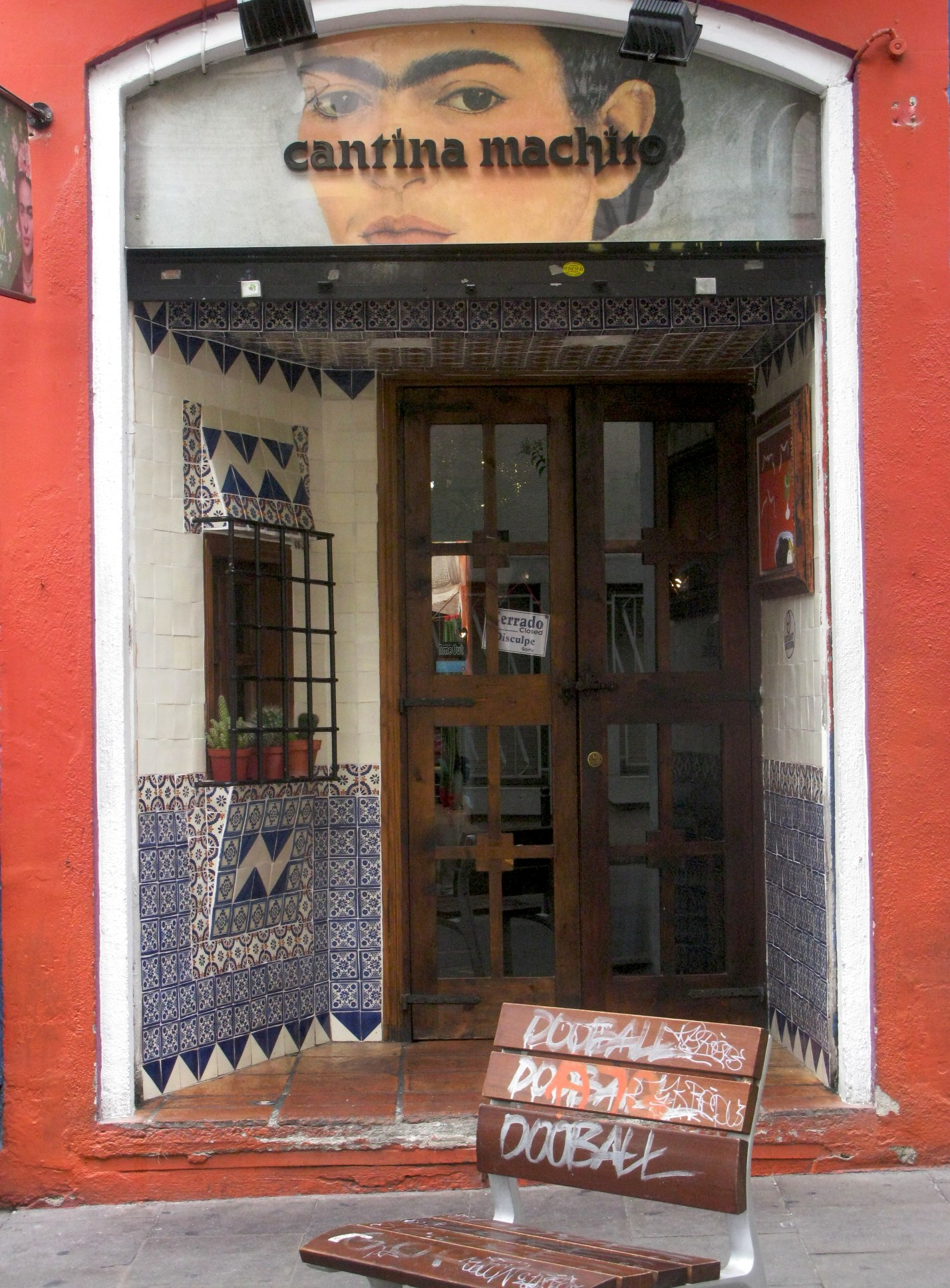 carrer Torrijos, 47, Barcelona